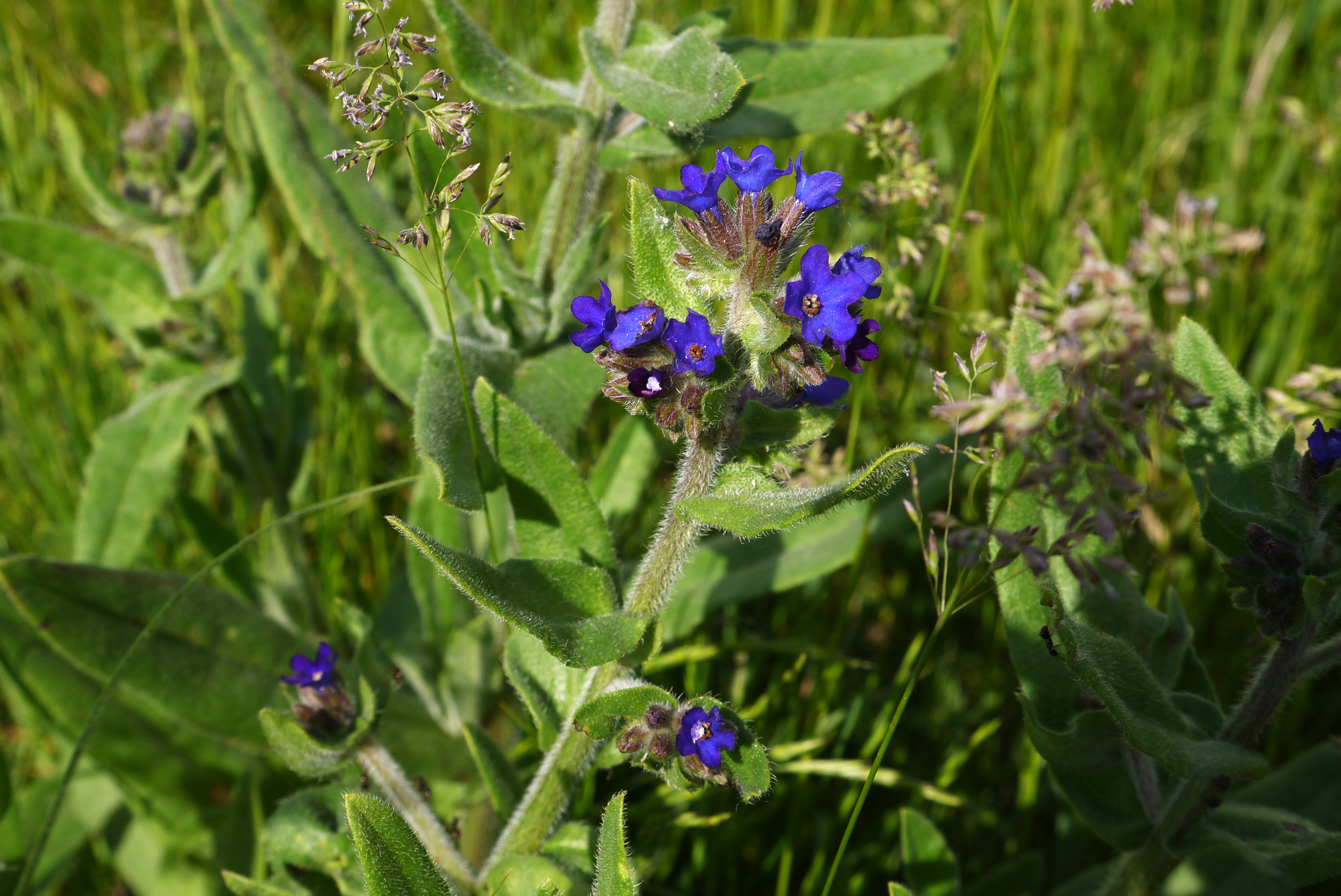 «Стрижавські орхідеї», Вінницький район, Стрижавська селищна рада